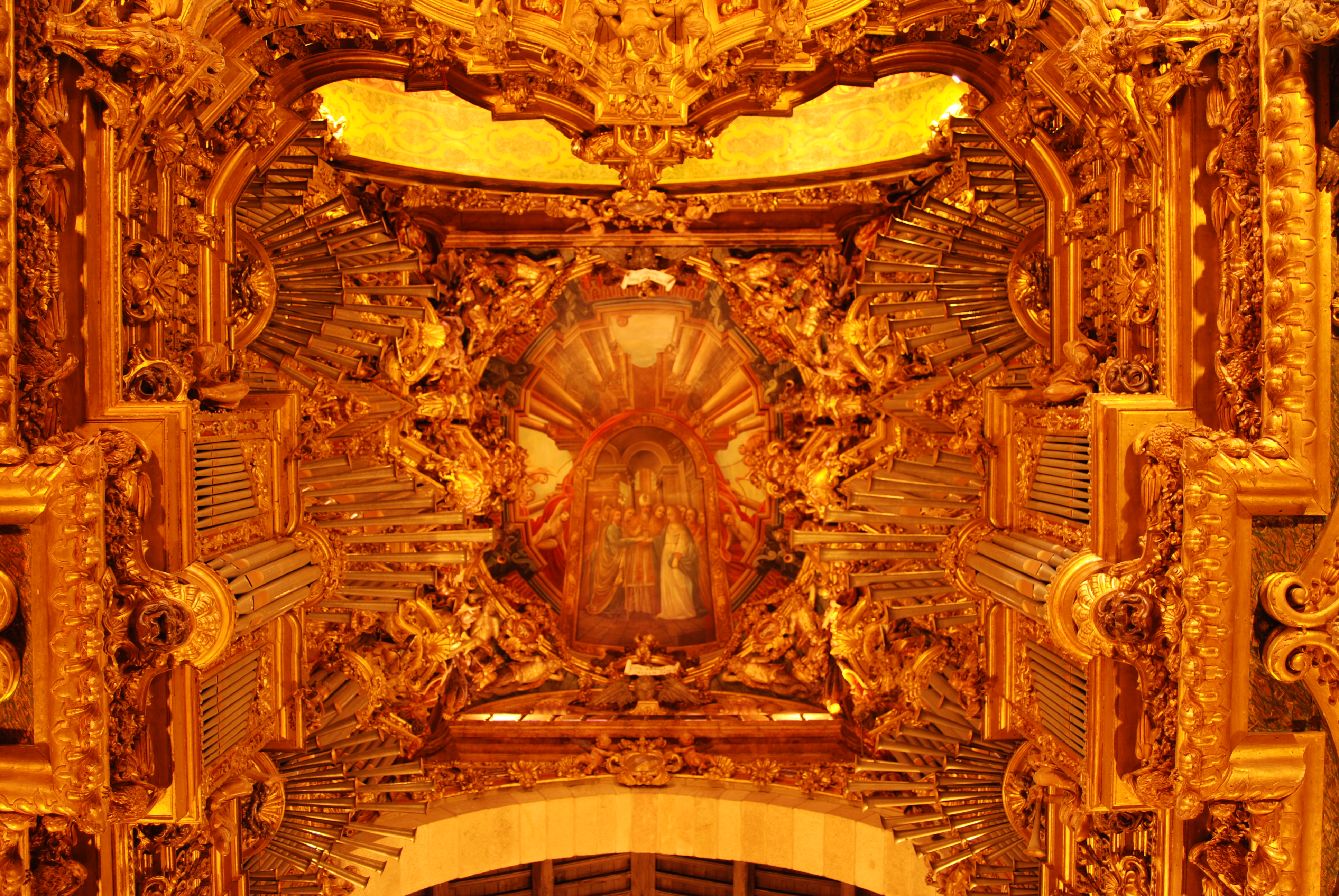 Organ inside Sé de Braga, Portugal, Europe